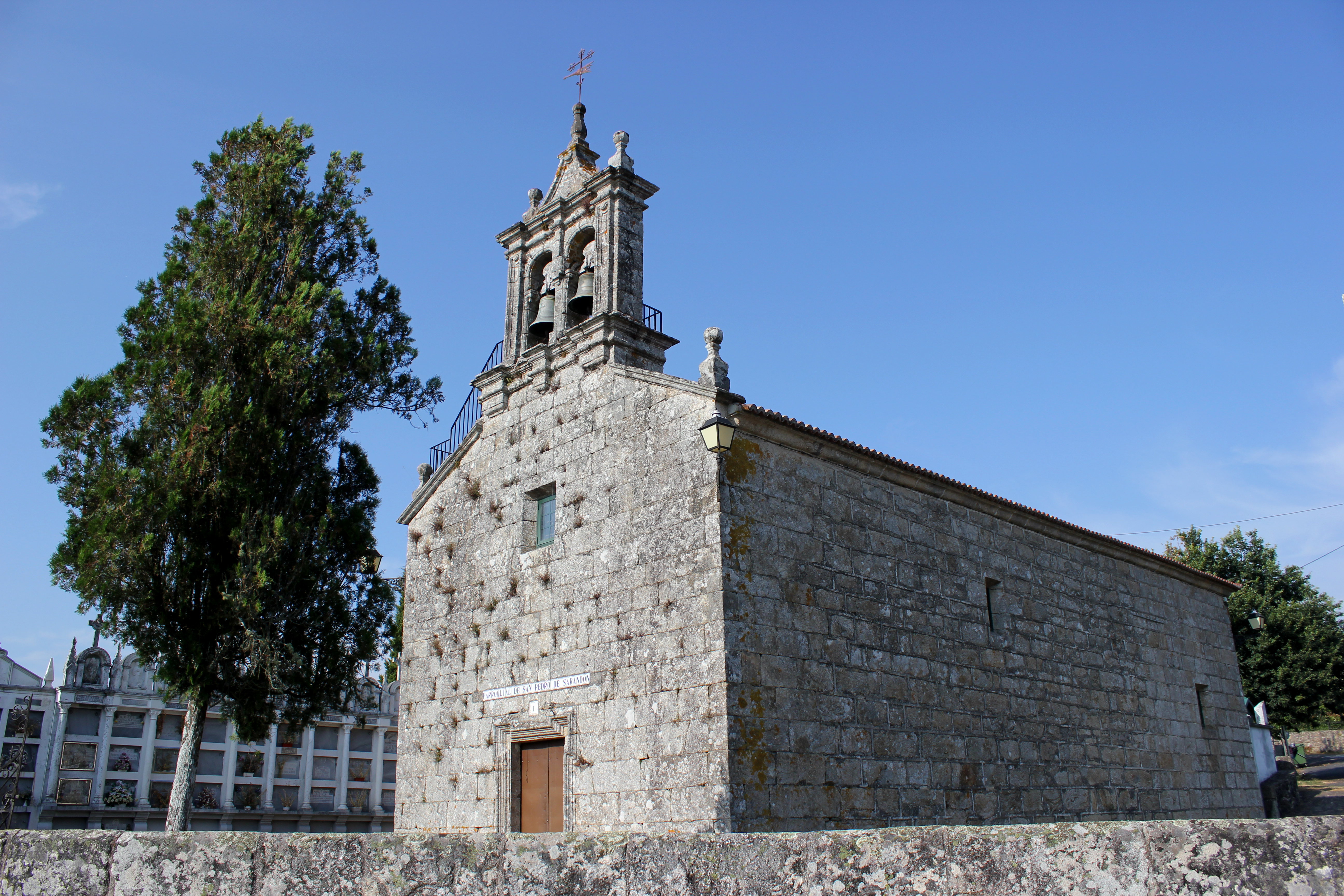 Igrexa de San Pedro de Sarandón no concello de Vedra.